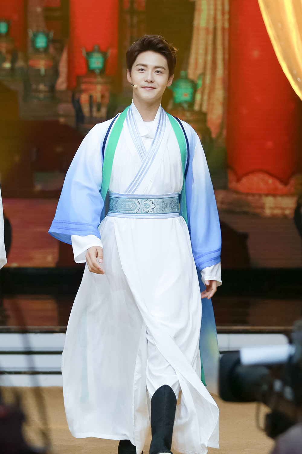 160419 快本录制